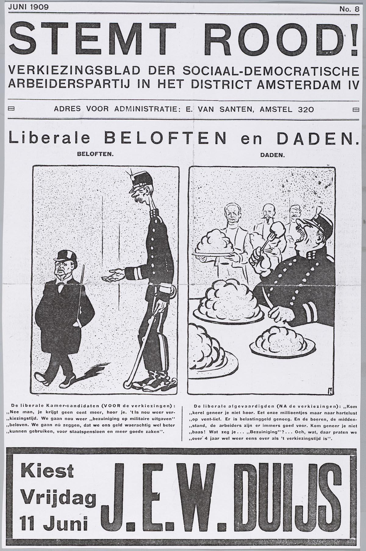 Verkiezingsblad: Liberale beloften en daden